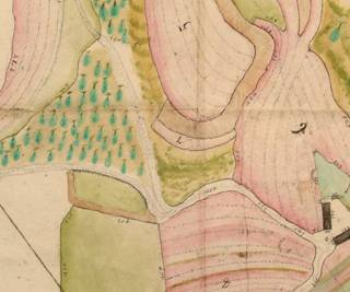 Flurkarte, um 1800 (Staatsarchiv Sigmaringen, Recherche F. Kanzler 2006). Ausschnitt: Gelände um die Heuneburg vor der Verebnung des Walles und mit der alten Wegeführung.